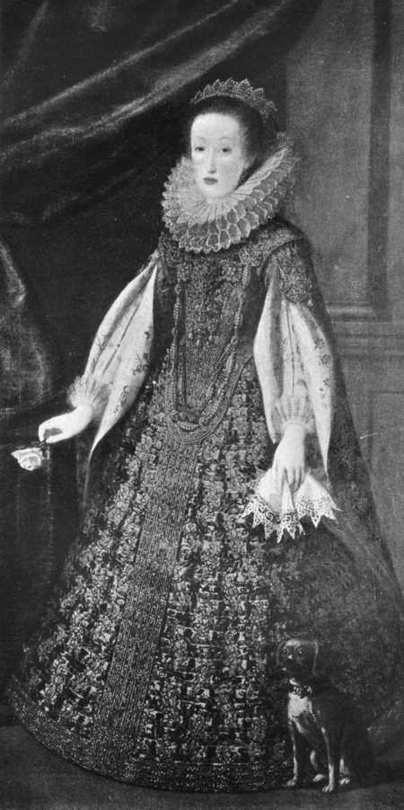 Eleonora_di_ferdinando_de'_medici, xvi century print